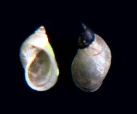 Lymnaea